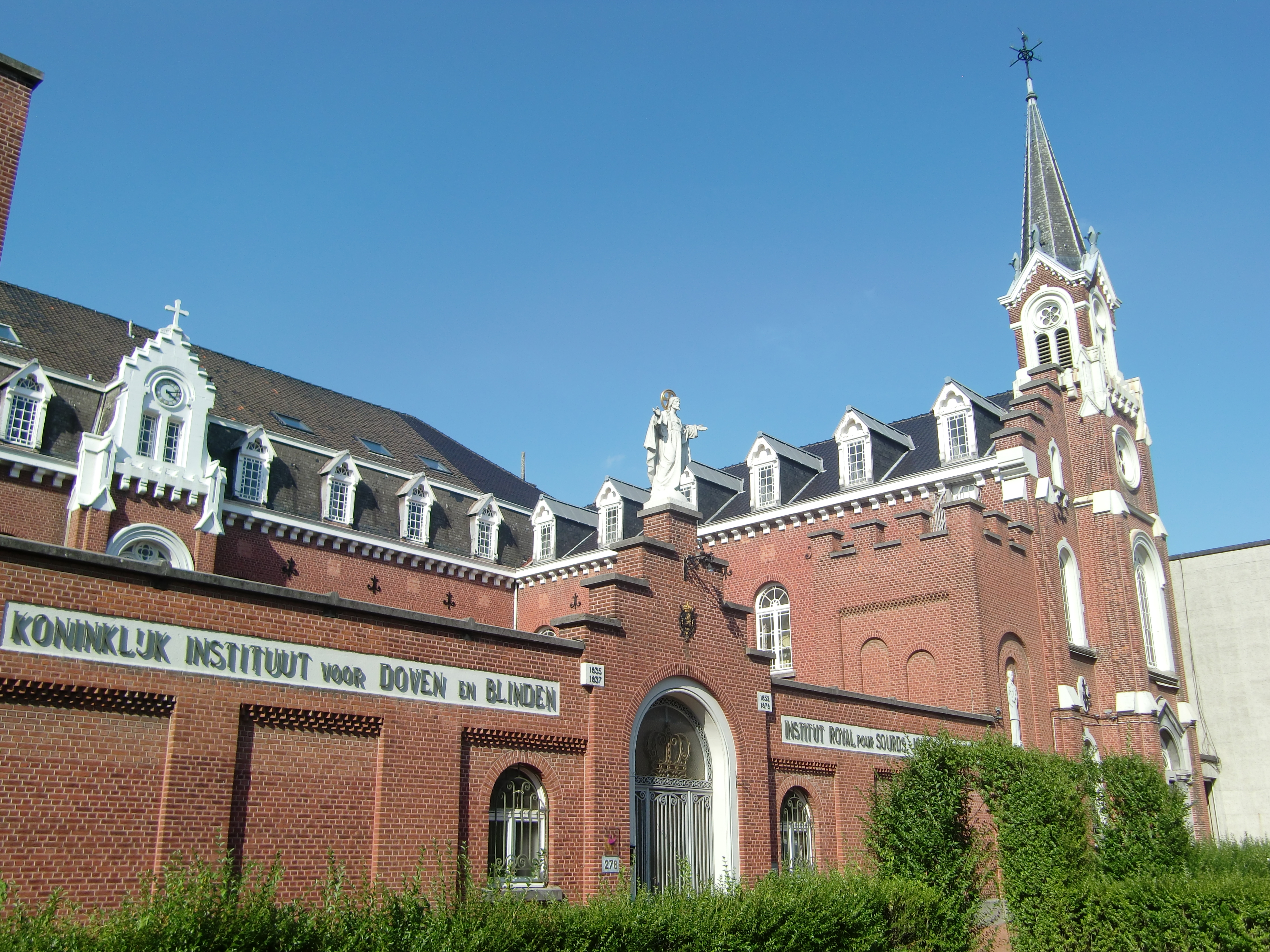 2278-00400 Institut Royal pour Sourds Muets et Aveugles